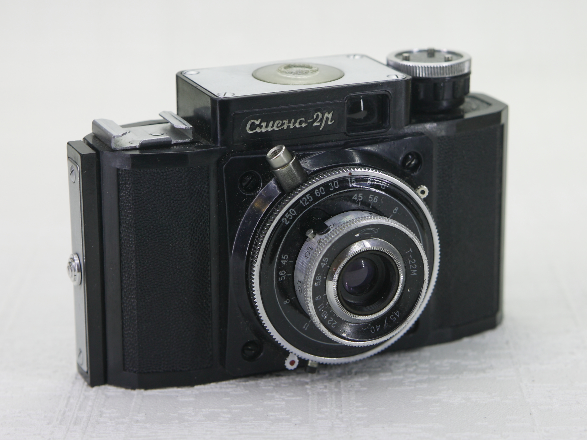 Шкальный пленочный фотоаппарат Смена 2М, производство Минск